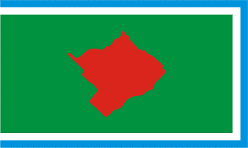 Bandera del Partido de Las Flores (Buenos Aires, Argentina).